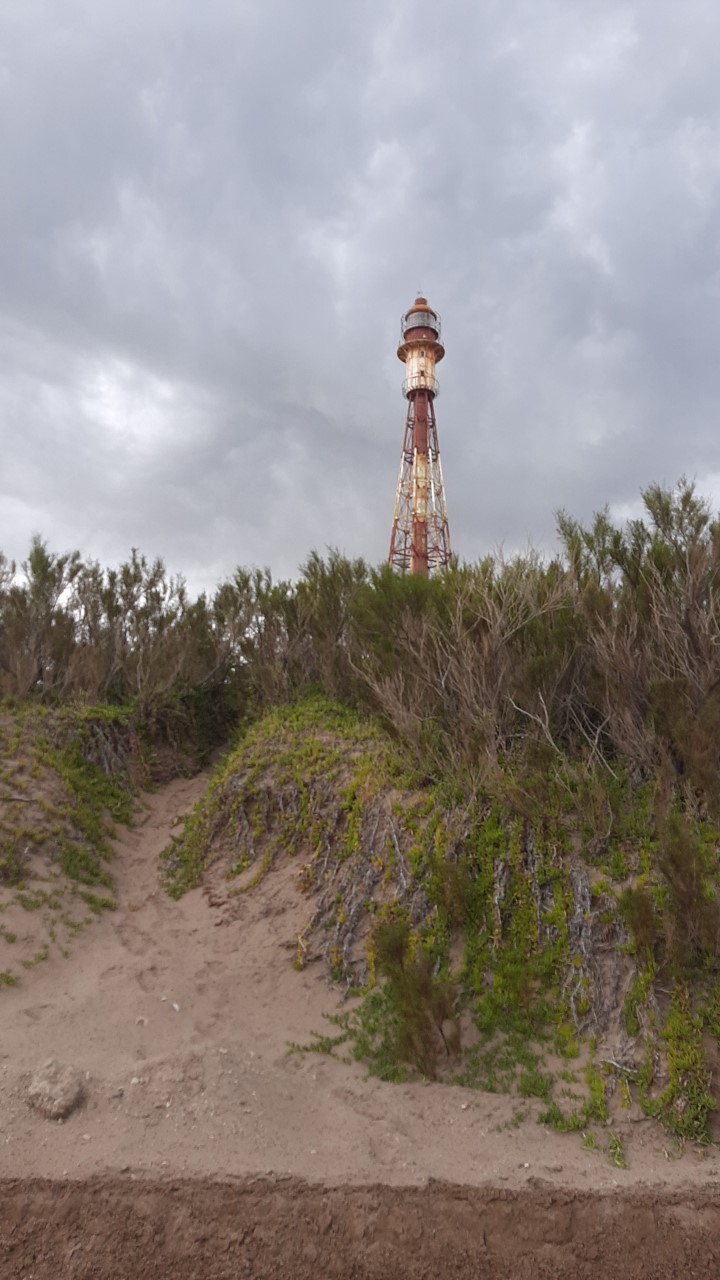 Faro ubicado en la ciudad de Monte Hermoso, Provincia de Buenos Aires, República Argentina